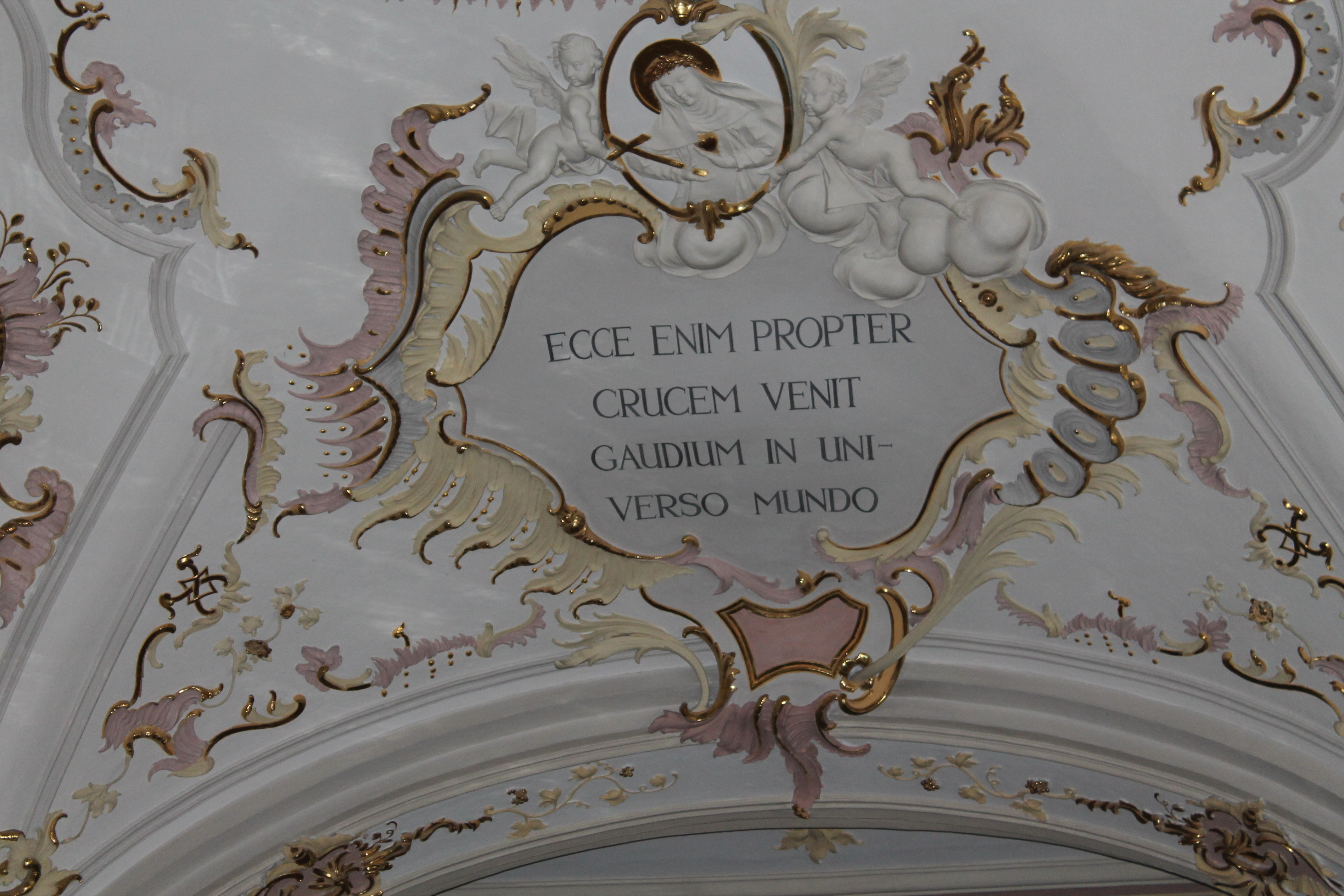 Inschrift